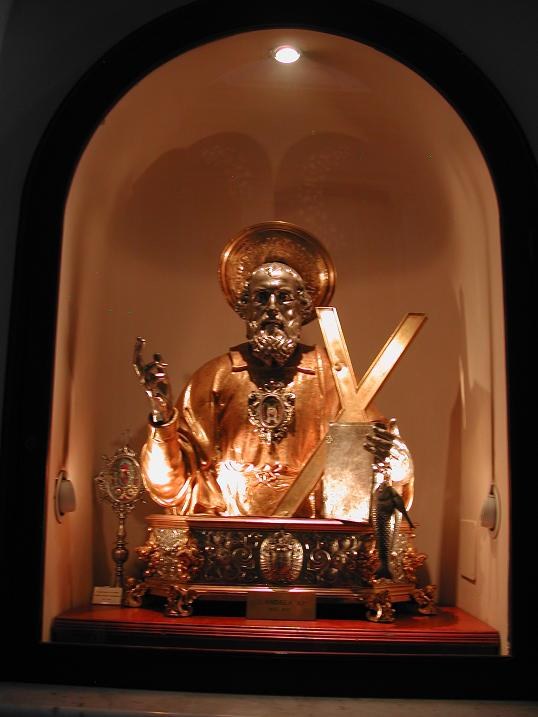 Busto di San Andrea (in argento cesellato del sec. XVI), patrono di Amalfi, in una nicchia laterale all'interno del Duomo foto di Aldo Ardetti (13 agosto 2007)